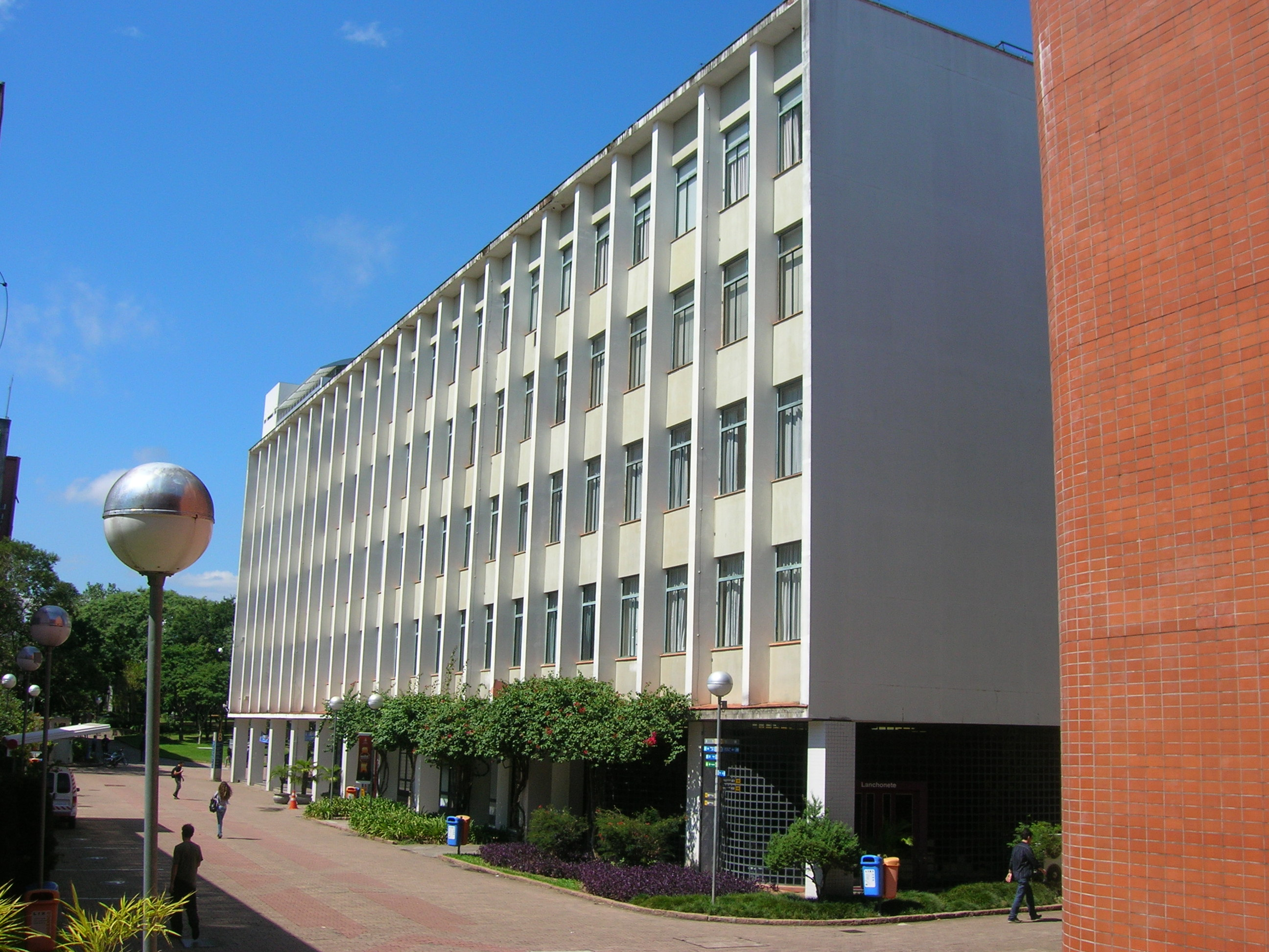 O prédio 8 da Pontifícia Universidade Católica do Rio Grande do Sul (PUCRS), onde está instalada a Faculdade de Letras, além de outros órgãos da instituição.